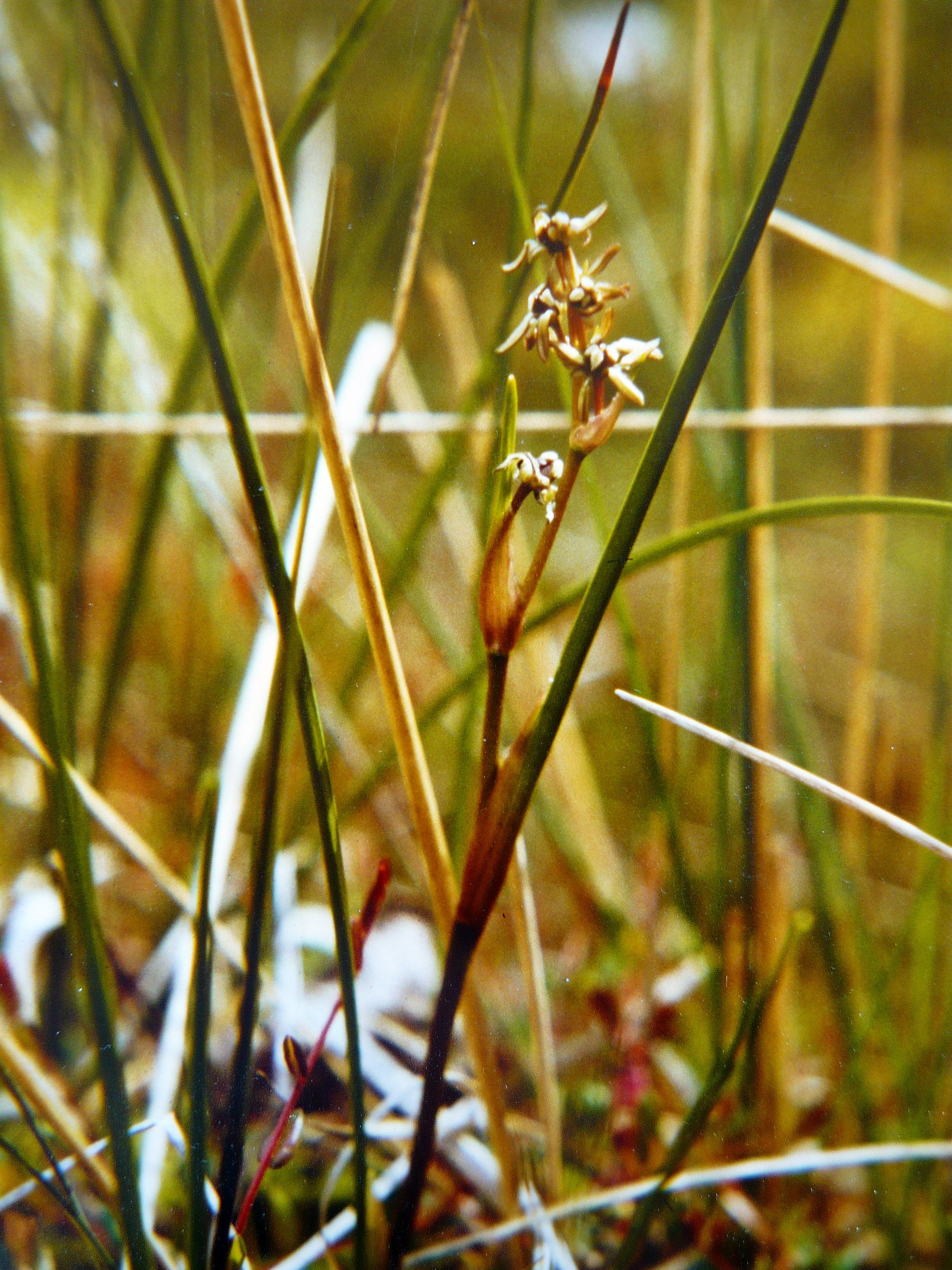 Blasenbinse (Scheuchzeria palustris) im NSG Südtannenmoor, Mai 1987 – damals drohte die Art hier zu verschwinden